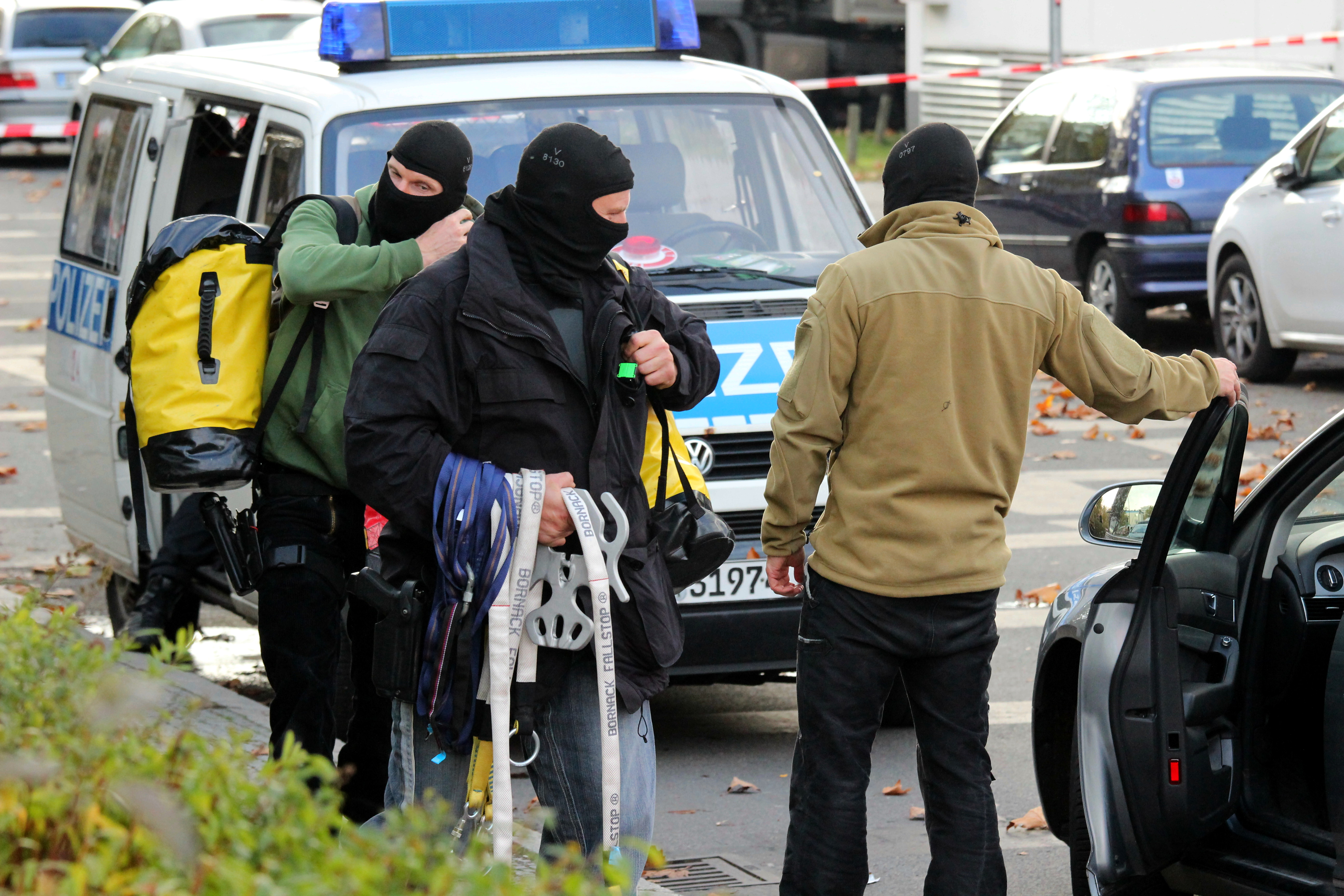 Einsatz der Berliner Polizei (SEK) in Berlin, 2014